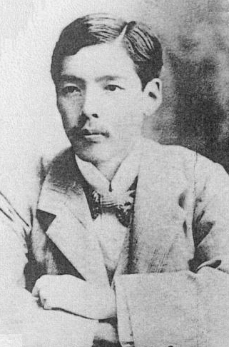 Ichizō Kobayashi (小林一三, 1873-1957).